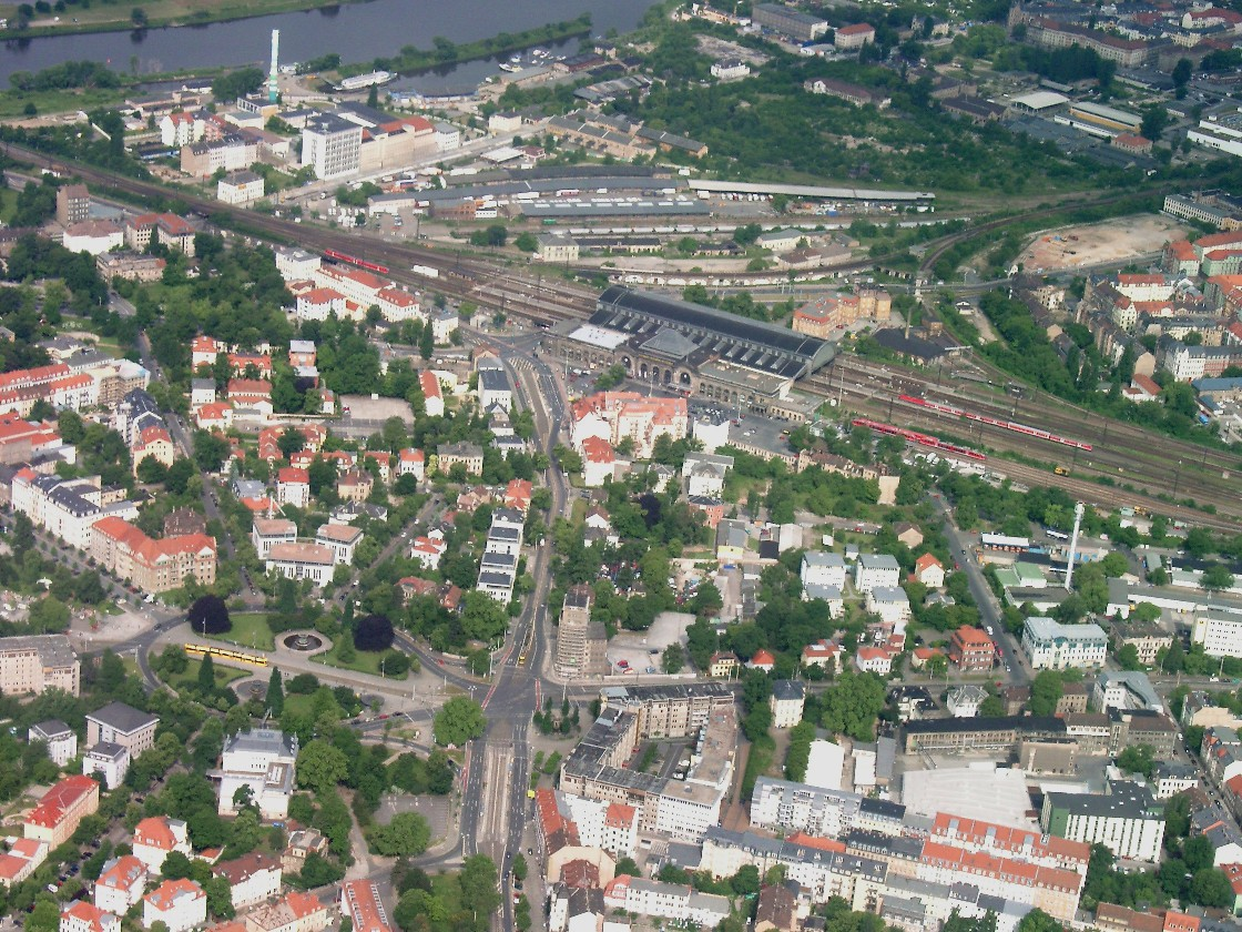 Luftbild der Dresdner Neustadt aus Richtung Osten, Blick über Albertplatz und Bahnhof Neustadt. – Links im Vordergrund ist der Albertplatz, etwa mittig der Bahnhof mit dem Schlesischen Platz. Nach links gehen die Züge in Richtung Hauptbahnhof ab, nach rechts ins Umland und in Richtung Oberlausitz, Berlin, Leipzig.